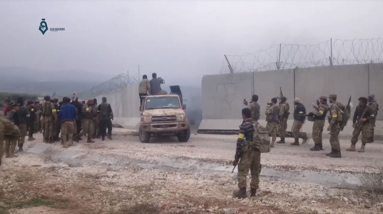 Rebelles de l'Armée syrienne libre près de Jandiris, lors de la bataille d'Afrine, le 11 février 2018.